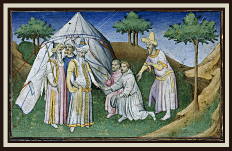 Les frères Polo rencontrent Qubilaï, vers 1410-1412, in Recueil de manuscrits traduit en français par Jean le Long, contenant Marco Polo.- Le Livre des merveilles ; Odoric de Pordenone.- Itinerarium de mirabilibus orientalium Tartarorum, & autres ouvrages.